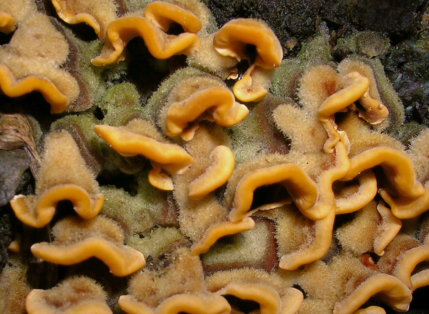 Owocnik Stereum hirsutum.